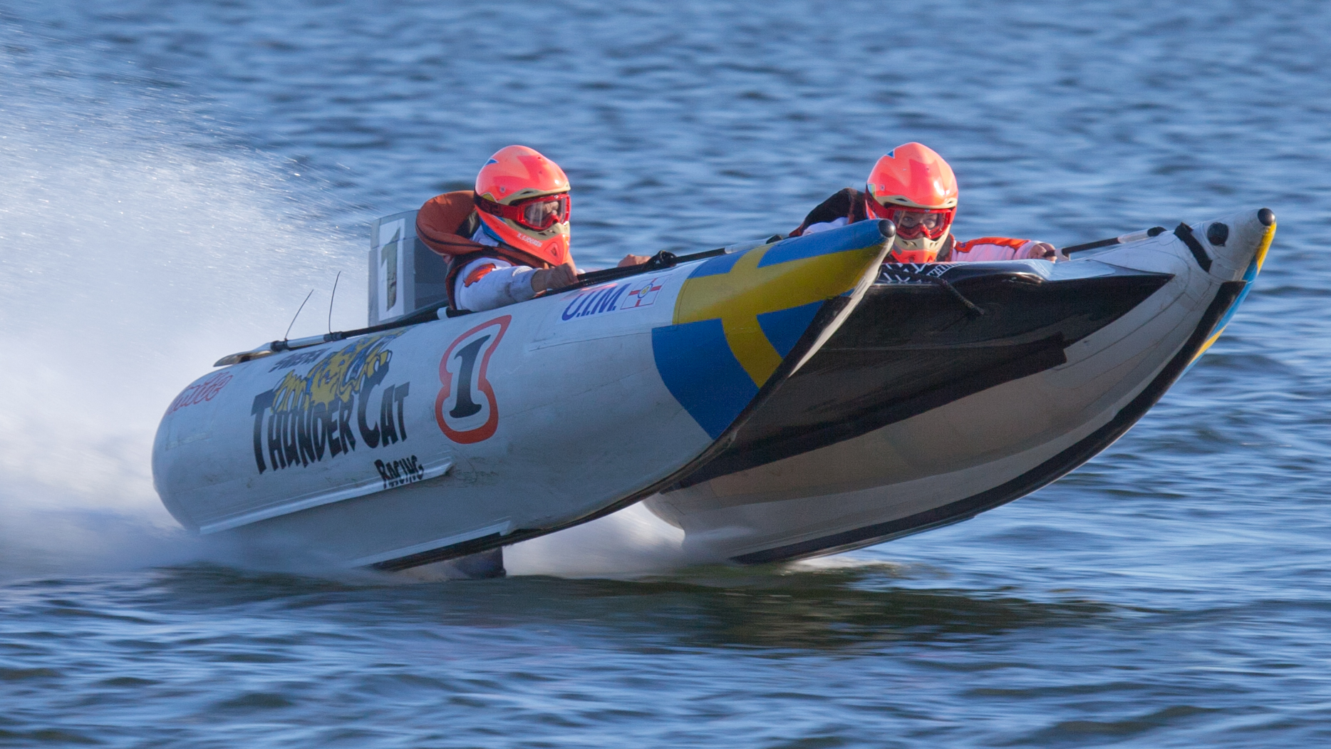 Vaxholmsloppet, Vaxholm, September 2011